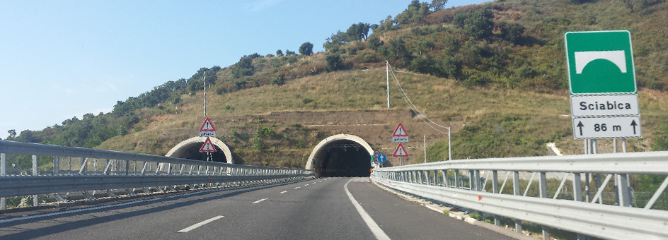 (Autostrada A3) Gallerie autostradali a Nocera Terinese, nei pressi del ponte che passa sul torrente Sciabica.